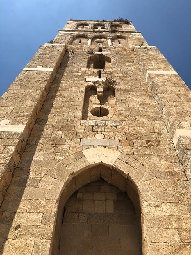 صورة سفلية للجامع الابيض